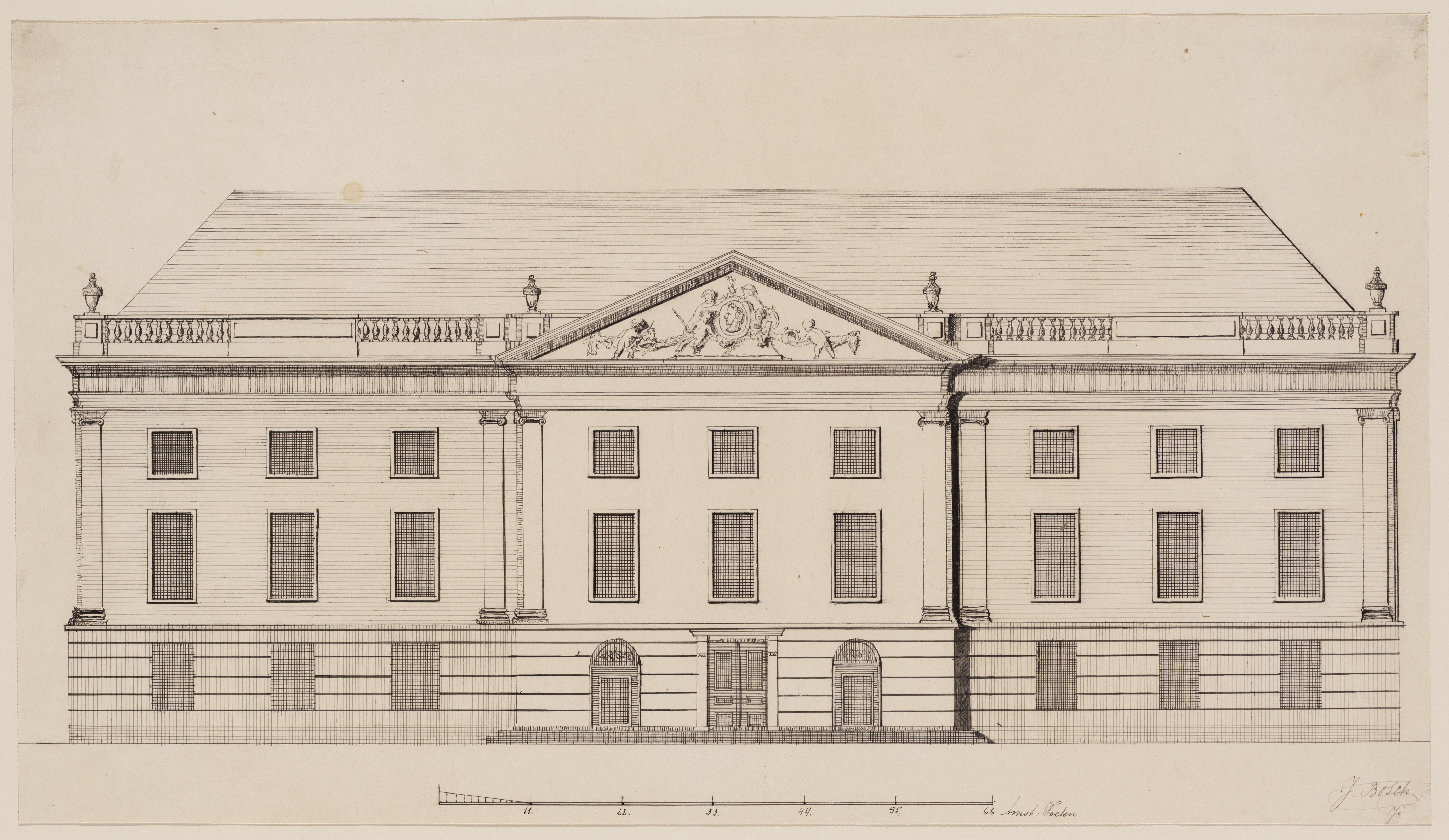 Prent